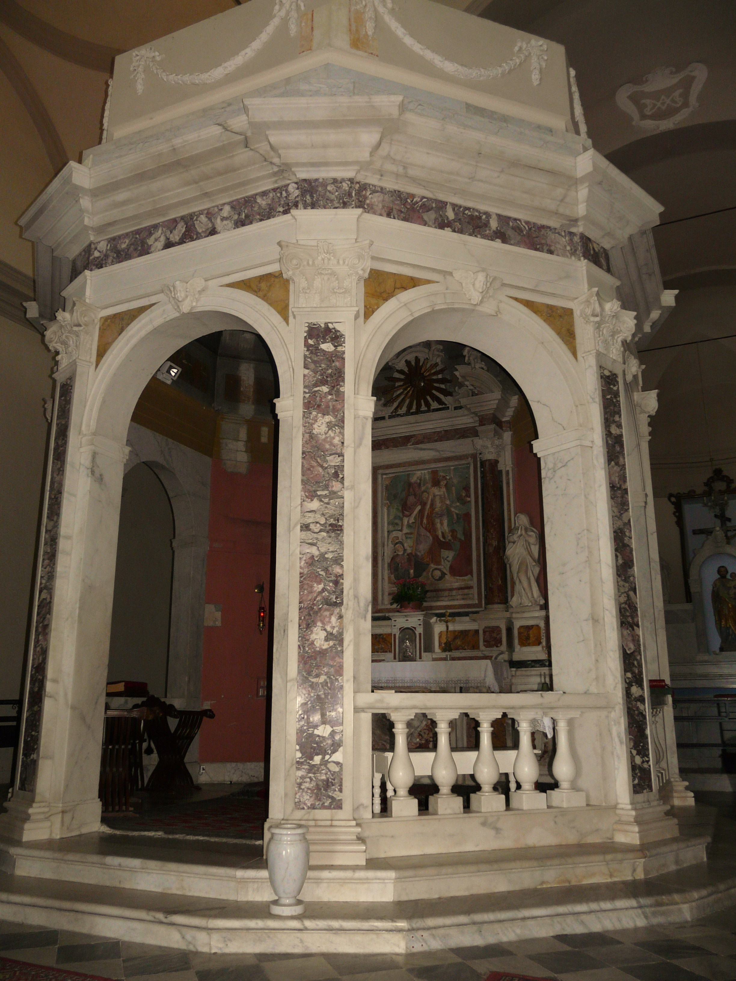 Santuario della Beata Vergine Addolorata del Mirteto, Ortonovo, Liguria, Italia